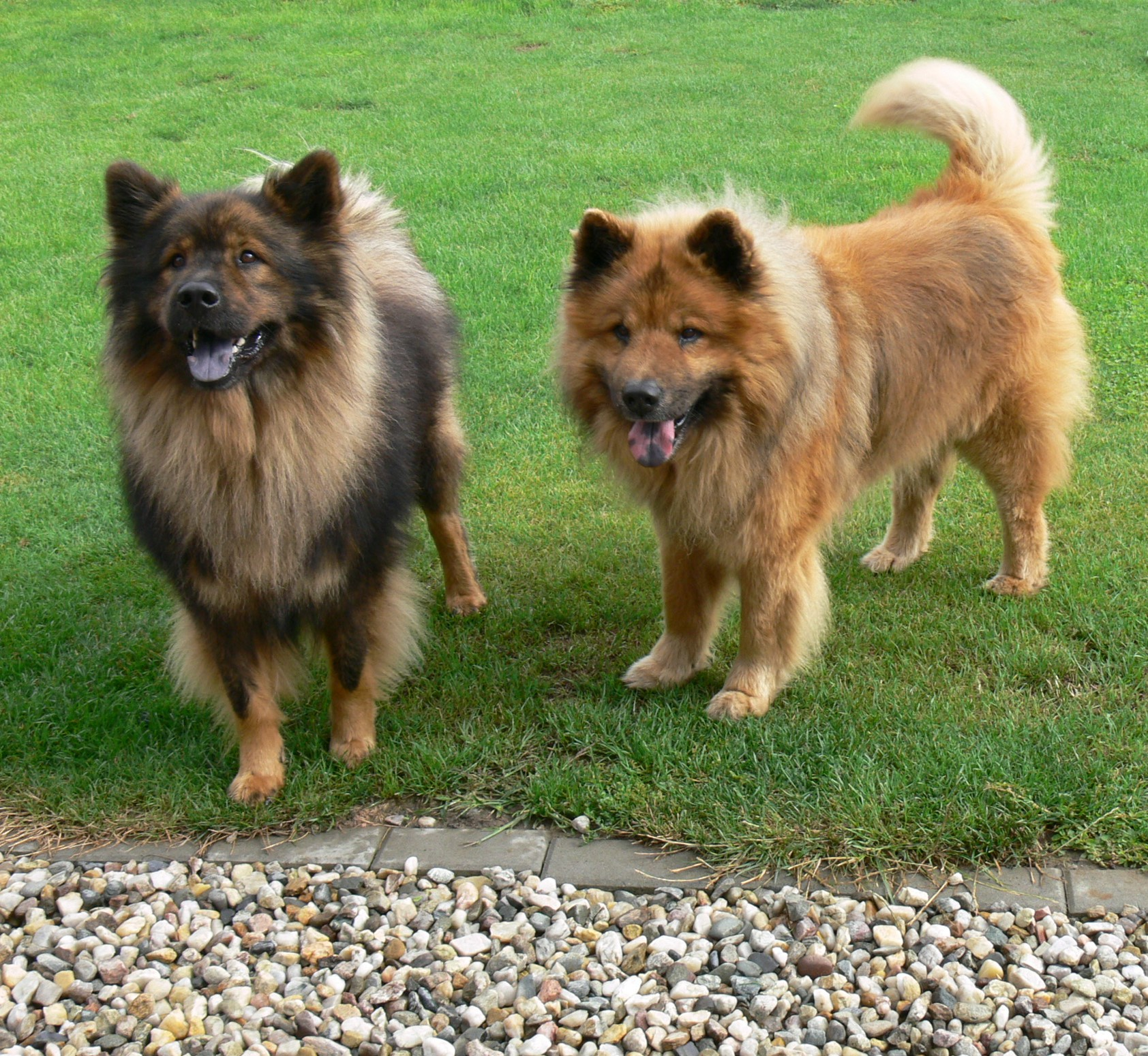 Eurasier